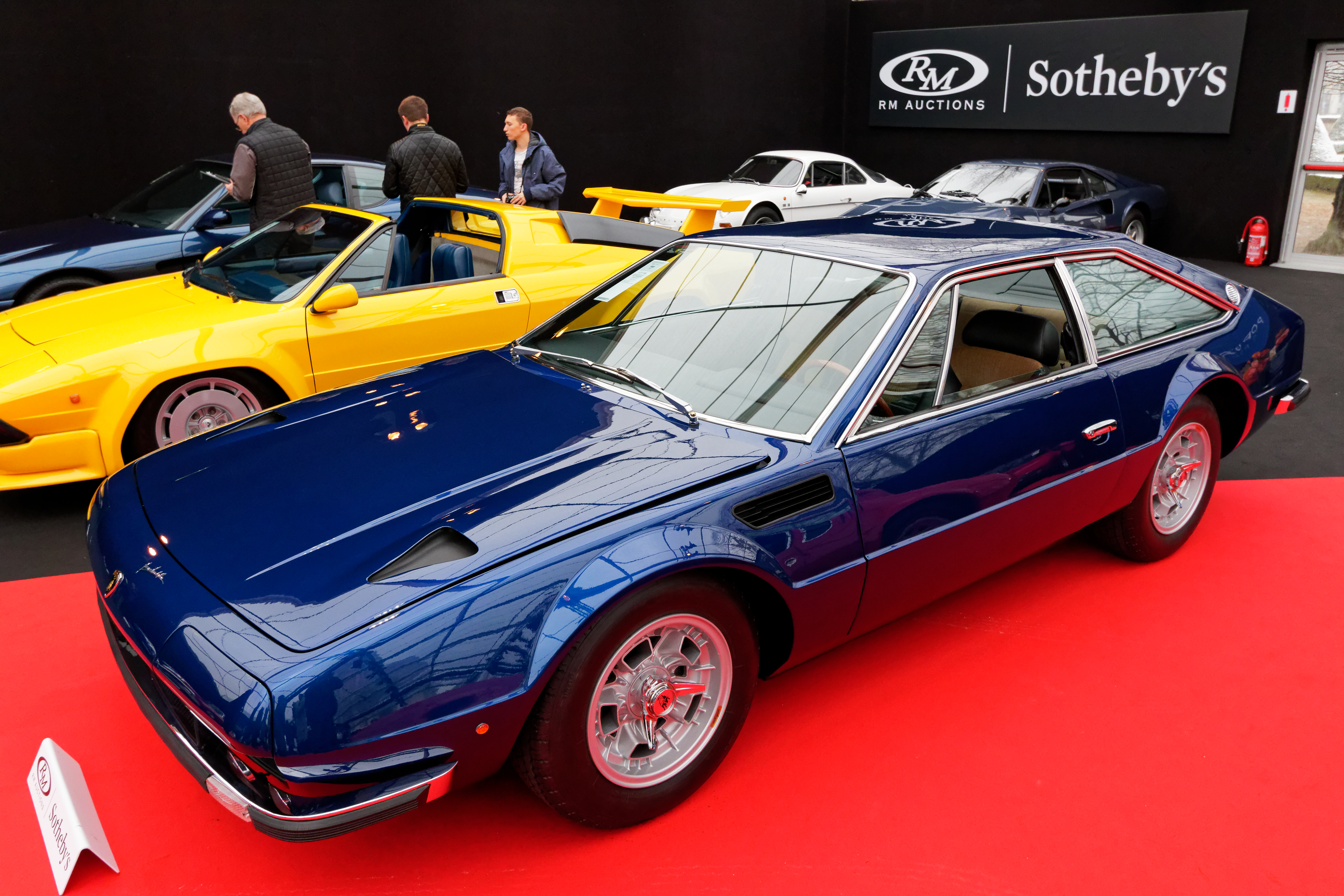 Un véhicule exposé lors de la vente RM Sotheby’s 2018 aux Invalides à Paris.